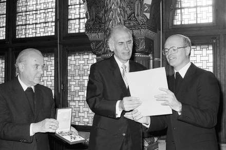 Freiburg im Breisgau: Erzbischof Oskar Saier verleiht Hermann Herder einen Orden